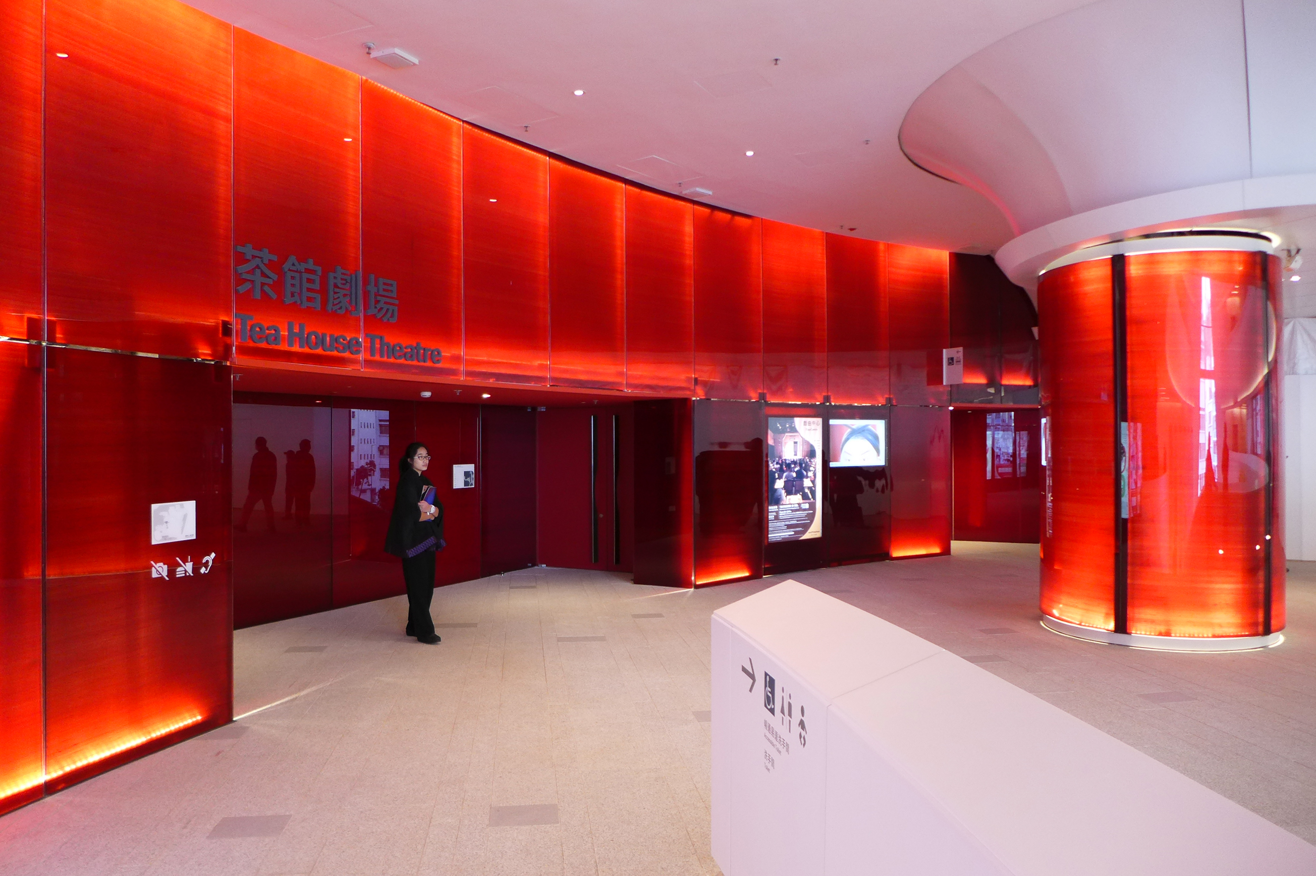 Xiqu Centre Tea House Theatre Entrance